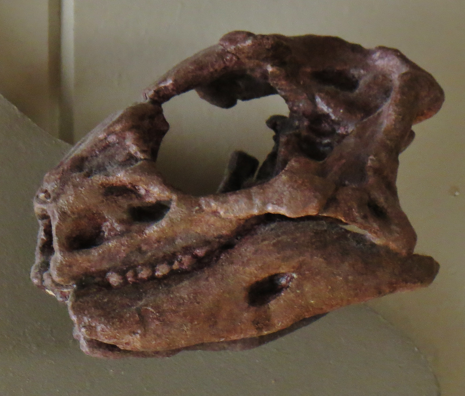 Fossil - Took The picture at Royal Belgian Institute of Natural Sciences, Brussels